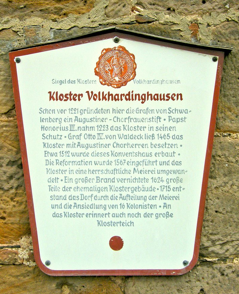 Hinweistafel - Kloster Volkhardinghausen(2008)